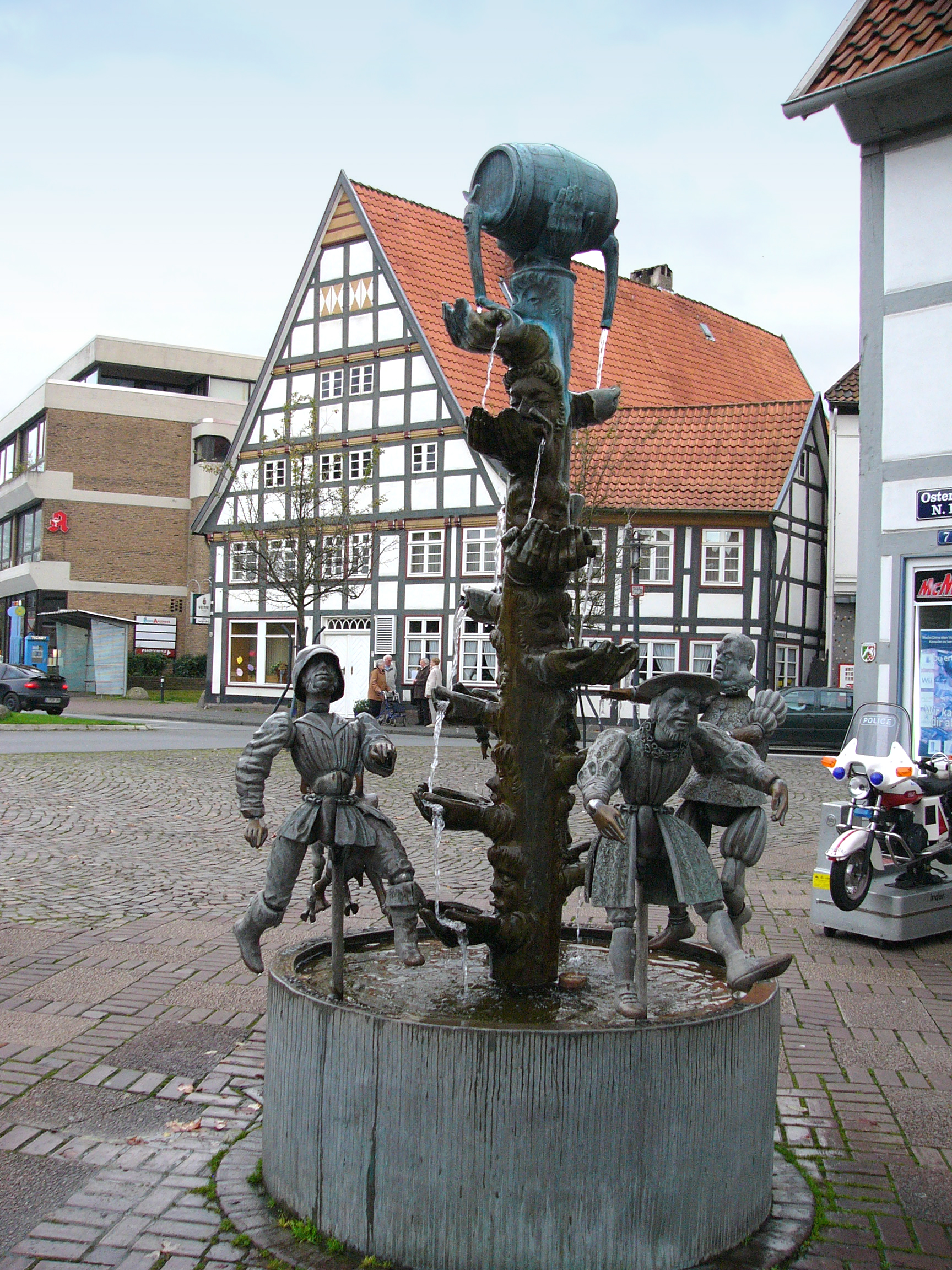 Ostertor und Kanzlerbrunnen in Lemgo, Germany